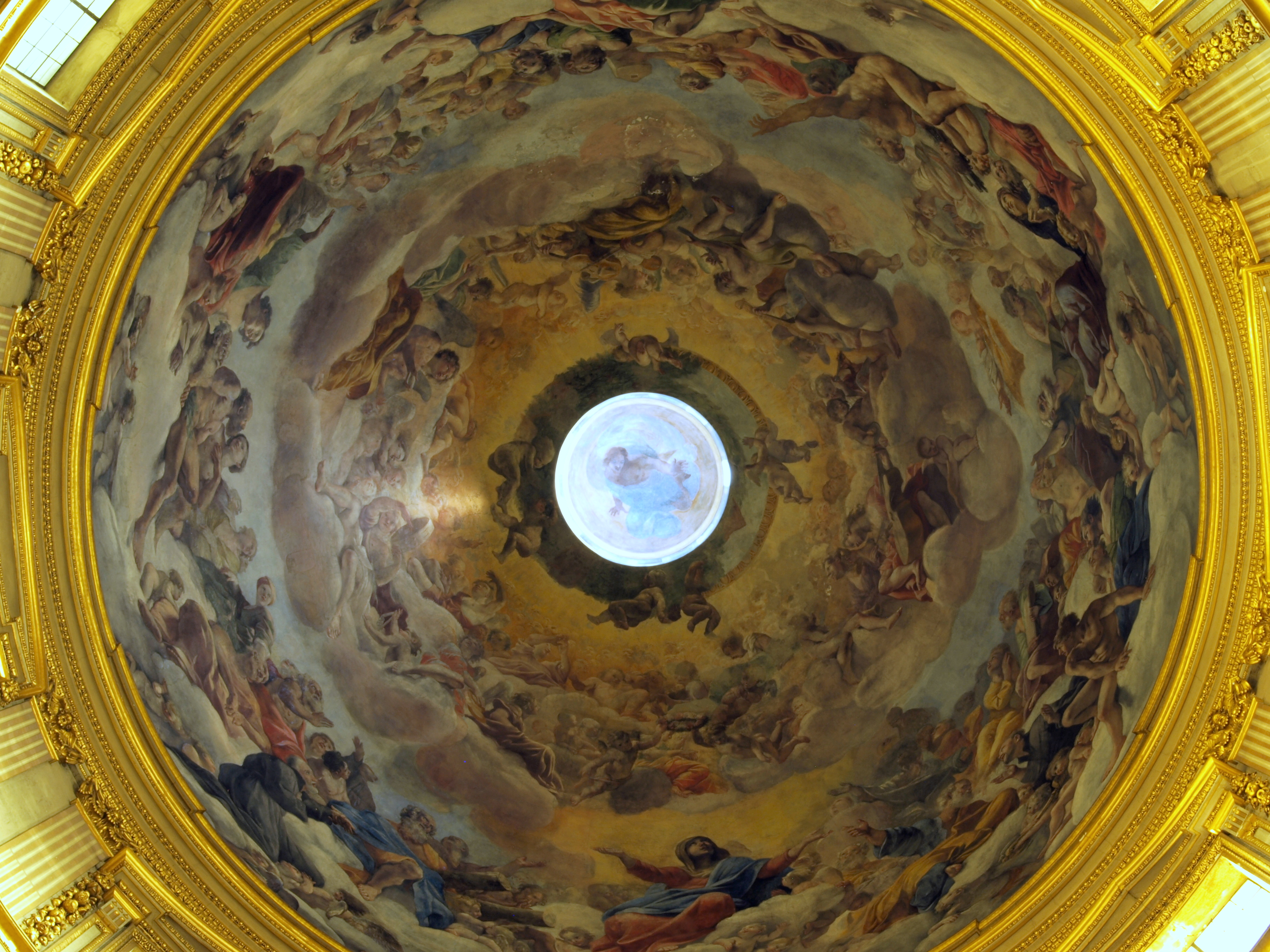 Dome